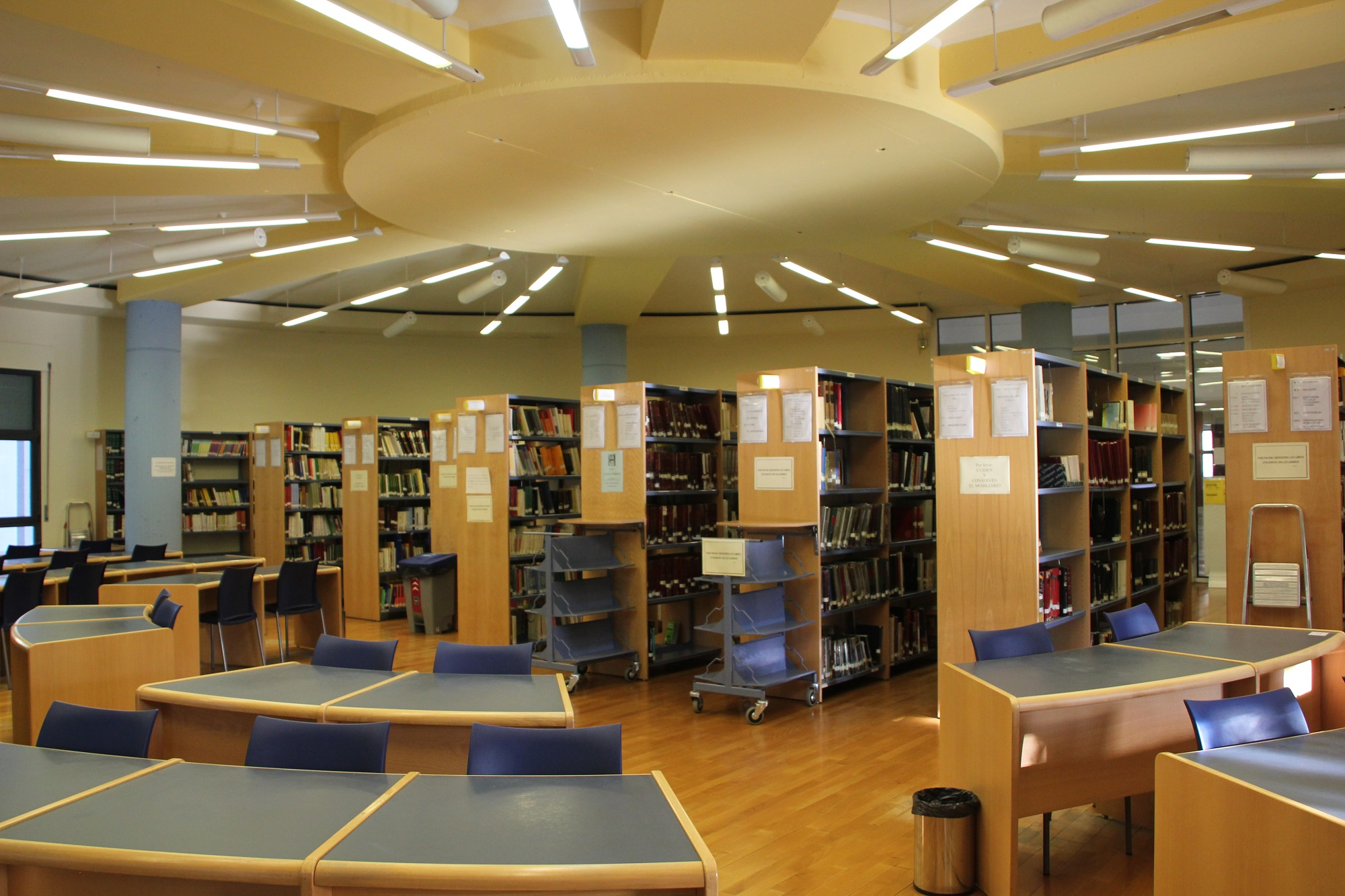 Biblioteca de la Facultad de Filosofía y Letras de la Universidad de Valladolid (España)